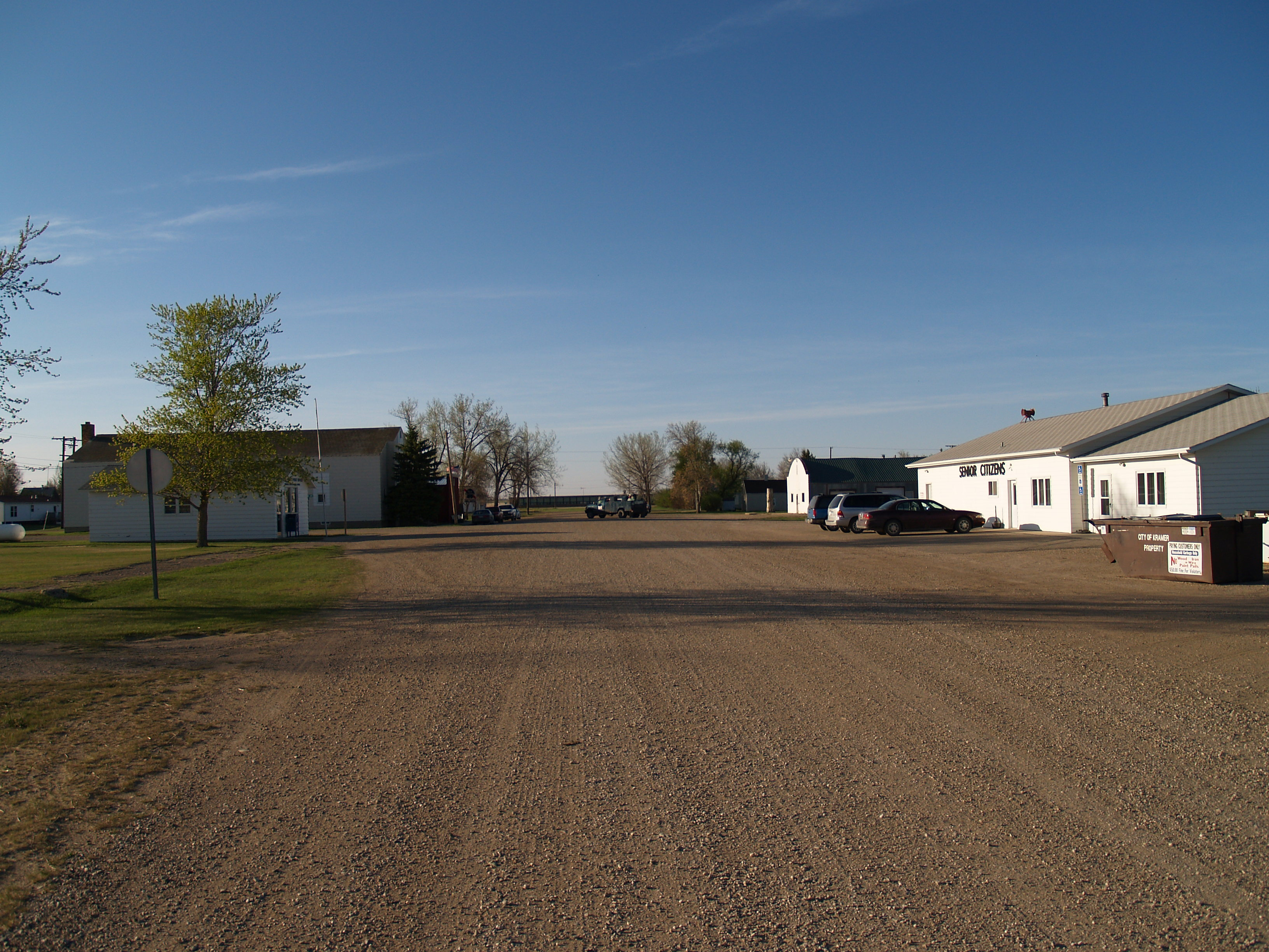 Kramer, North Dakota